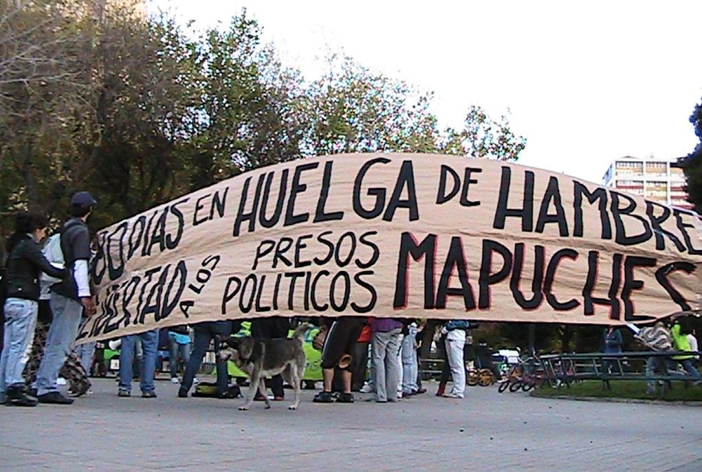 2 Manifestación de Psicólogos y estudiantes de Psicología en Apoyo al Pueblo Mapuche frente al Congreso Nacional en Valparaíso. En la ocasión se entregó la Declaración de Psicólogos frente al Conflicto Estado - Mapuche dirigida al Presidente del Senado y la Presidenta de la Cámara de Diputados. Jueves 30 de septiembre de 2010.